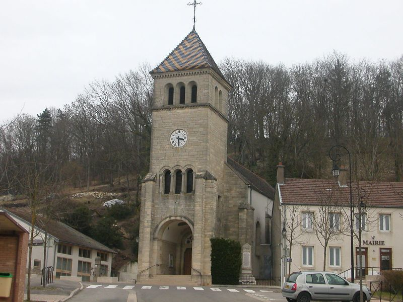 église de DAIX 21